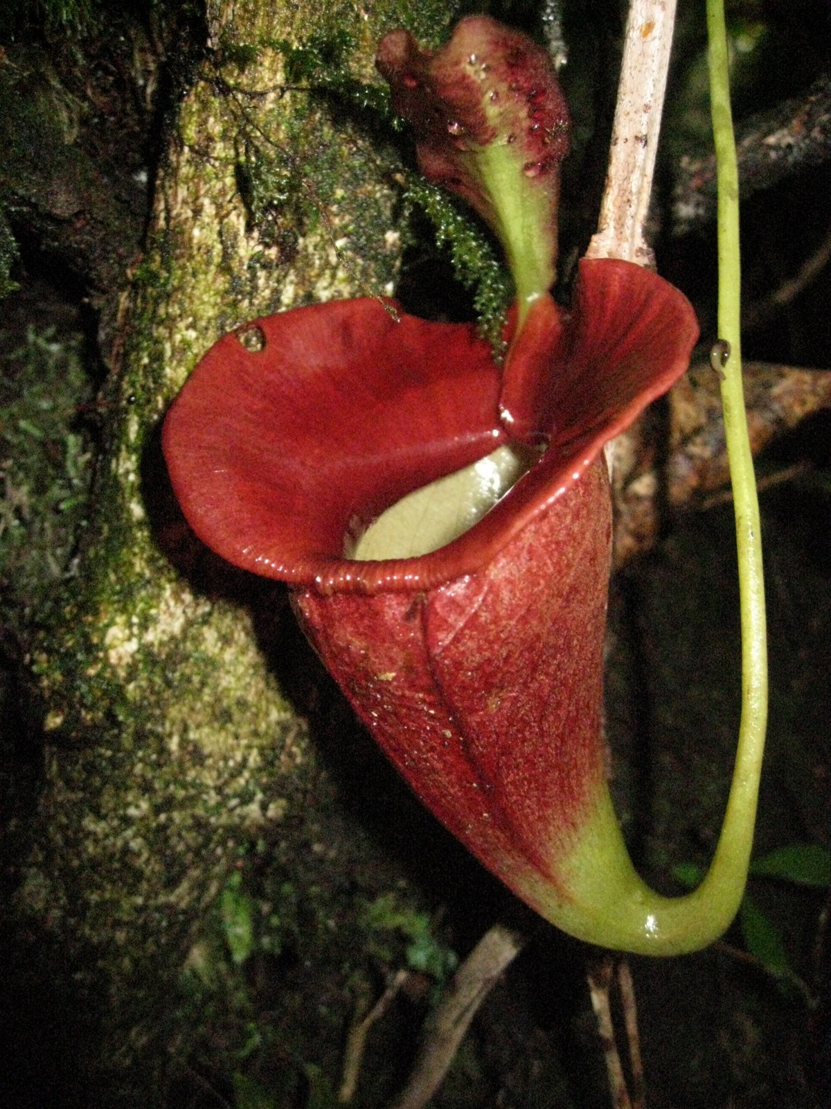 Nepenthes jacquelineae